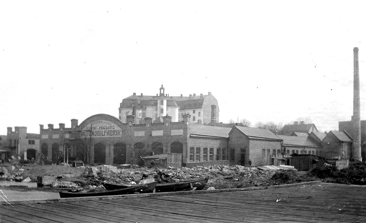 DIG92779 Gustaf L. M. Ericssons automobilfabrik vid Liljeholmen, 1907. Bild från tidskriften Hemmets bildmaterial. en